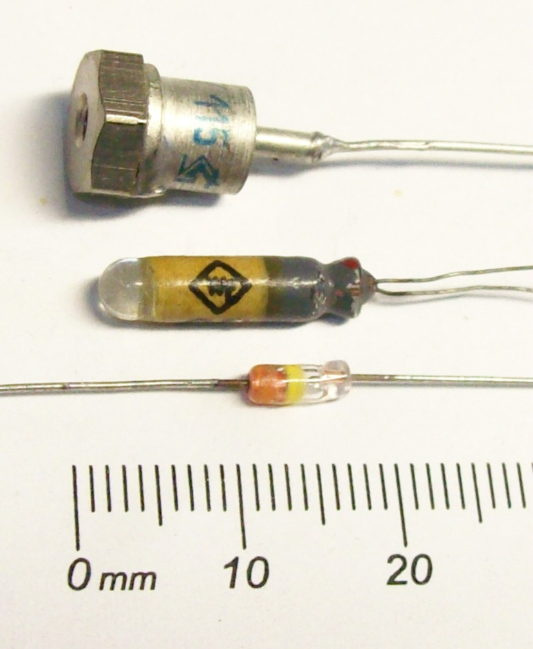 germanium diodes: top: rectifier diode GY115 (Gleichrichterwerk Grossräschen), mid: photodiode GP122 (WF - Werk für Fernsehelektronik Berlin), bottom: demodulator diode